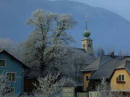 Die Kirche im Rottenmanner Ortsteil St. Georgen